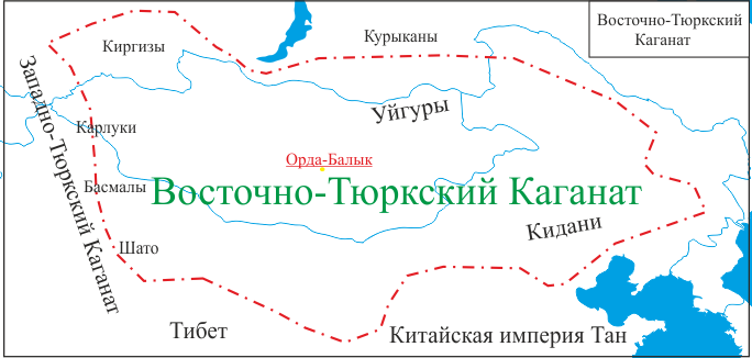 Карта Восточно-Тюркского каганата